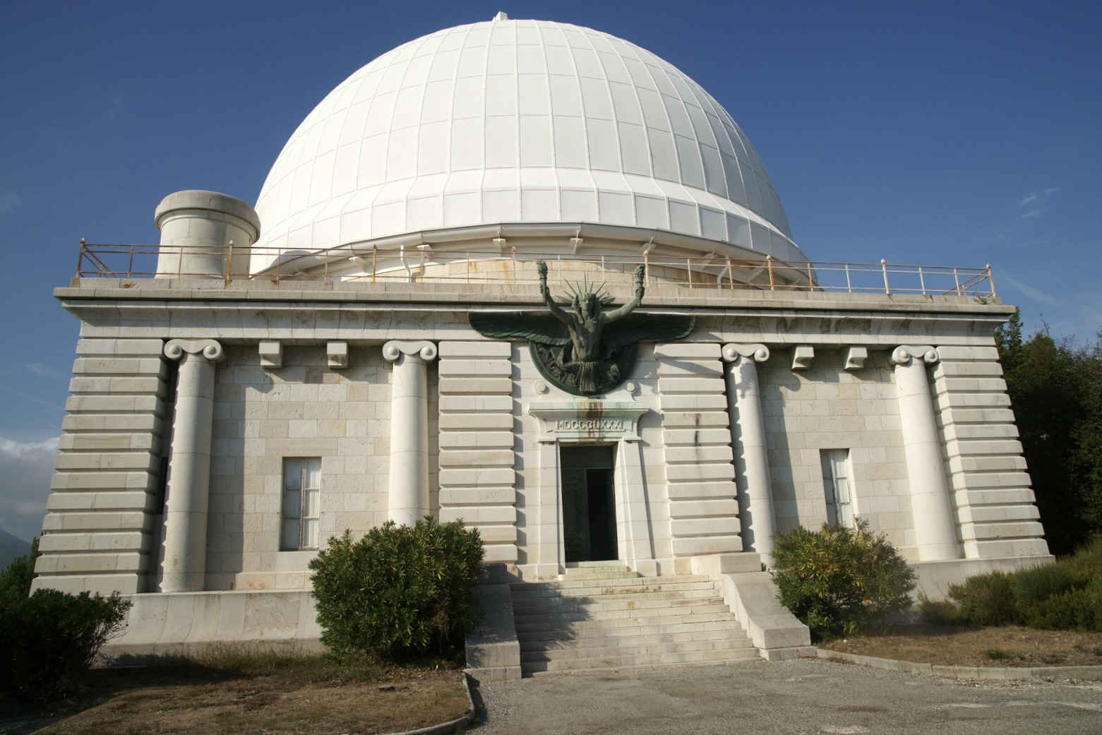 pavillon grand équatorial, observatoire de Nice, 2014